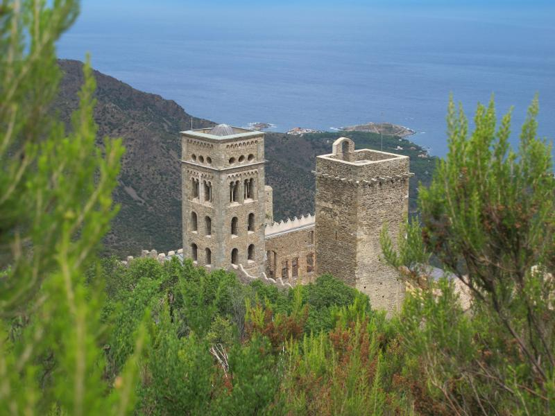 Monasterio de Sant Pere de Rodes (Parque Natural del cabo de Creus)